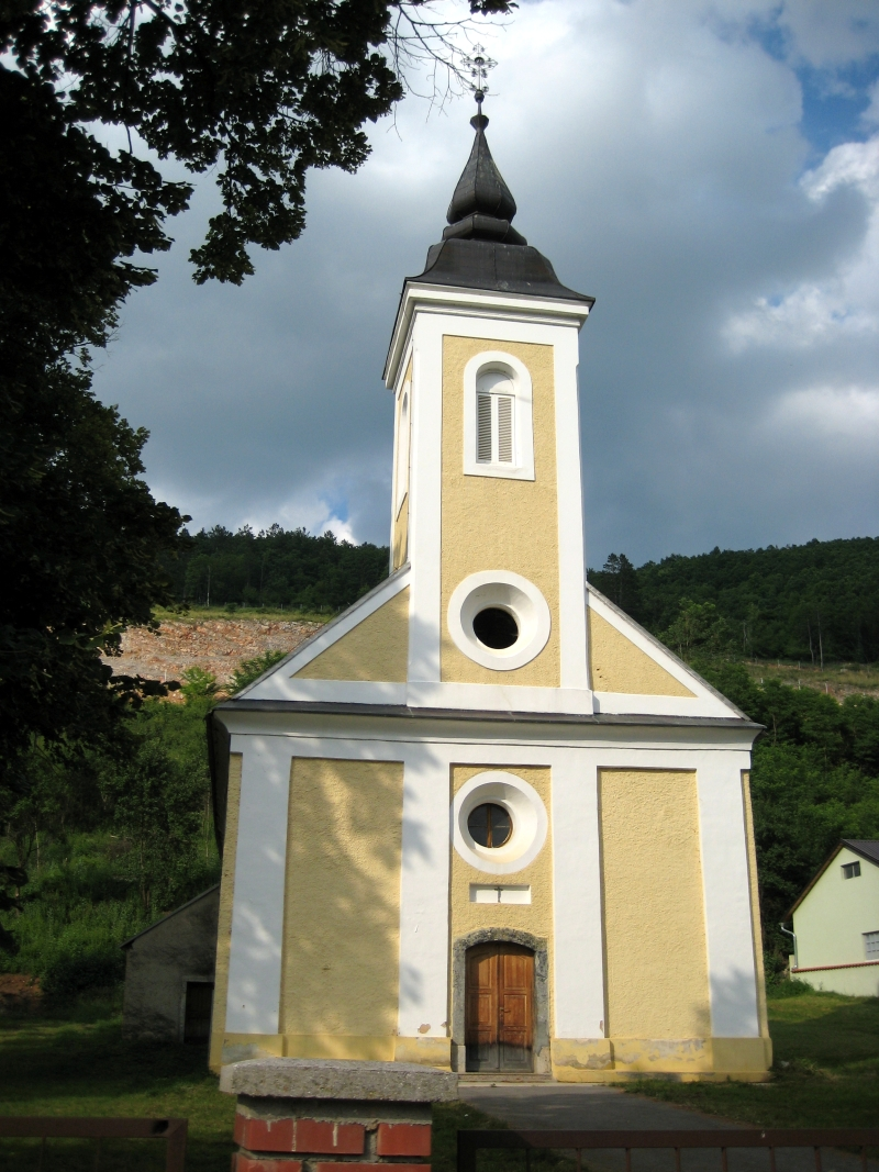 Crkva Svetog Stjepana Prvomučenika u Kompolju